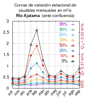 Curvas de variación estacional del río Ajatama antes de confluencia. # VÁSQUEZ GAMBOA, MÓNICA ANDREA, # Evaluación de recursos hídricos y modelo operacional, embalse Caritaya, Valle Cmarones, Región de Arica y Parinacota. # 2016 # url: # urlarchivo: # Tabla 8.6: Curva de Variación Estacional Quebrada Ajatama antes de confluencia, pág 127 mes 95% 90% 85% 70% 50% 25% 10% 5% oct 0.160 0.179 0.193 0.227 0.268 0.332 0.402 0.451 nov 0.126 0.145 0.159 0.193 0.235 0.304 0.383 0.440 dic 0.153 0.177 0.194 0.237 0.291 0.378 0.479 0.552 ene 0.142 0.190 0.231 0.347 0.528 0.903 1.464 1.956 feb 0.151 0.207 0.256 0.398 0.626 1.122 1.895 2.593 mar 0.189 0.233 0.268 0.361 0.488 0.720 1.022 1.261 abr 0.196 0.220 0.239 0.283 0.337 0.421 0.514 0.580 may 0.181 0.204 0.221 0.262 0.311 0.388 0.474 0.535 jun 0.176 0.207 0.231 0.291 0.368 0.497 0.653 0.768 jul 0.196 0.220 0.238 0.281 0.332 0.413 0.502 0.564 ago 0.187 0.210 0.228 0.269 0.320 0.399 0.486 0.547 sep 0.137 0.168 0.193 0.259 0.348 0.510 0.719 0.884